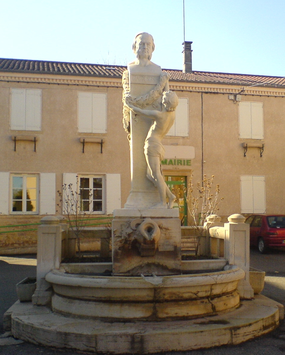 Fontaine avec effigie de Claude Bernard. Saint-Julien, Rhône, France.